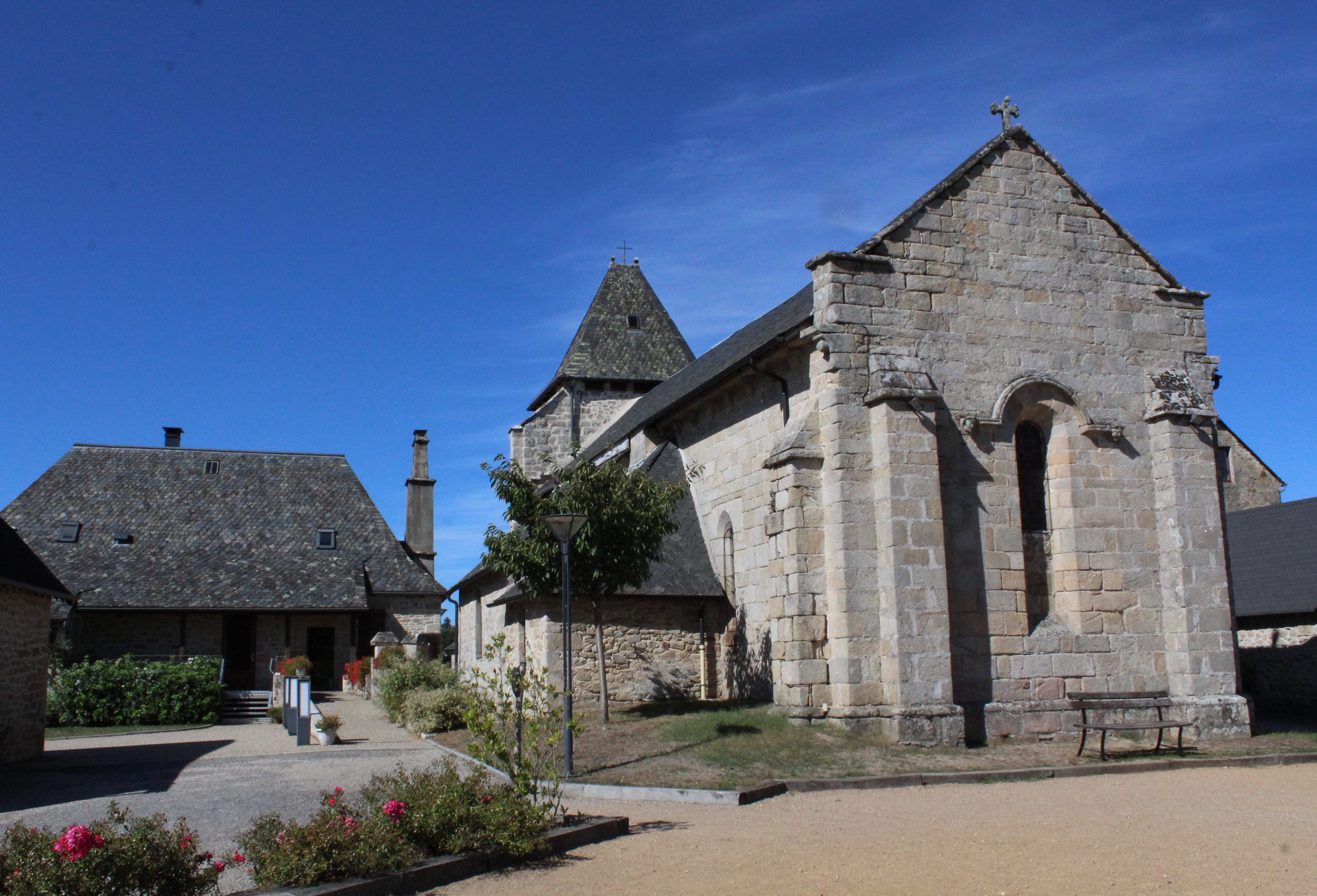 L'église.